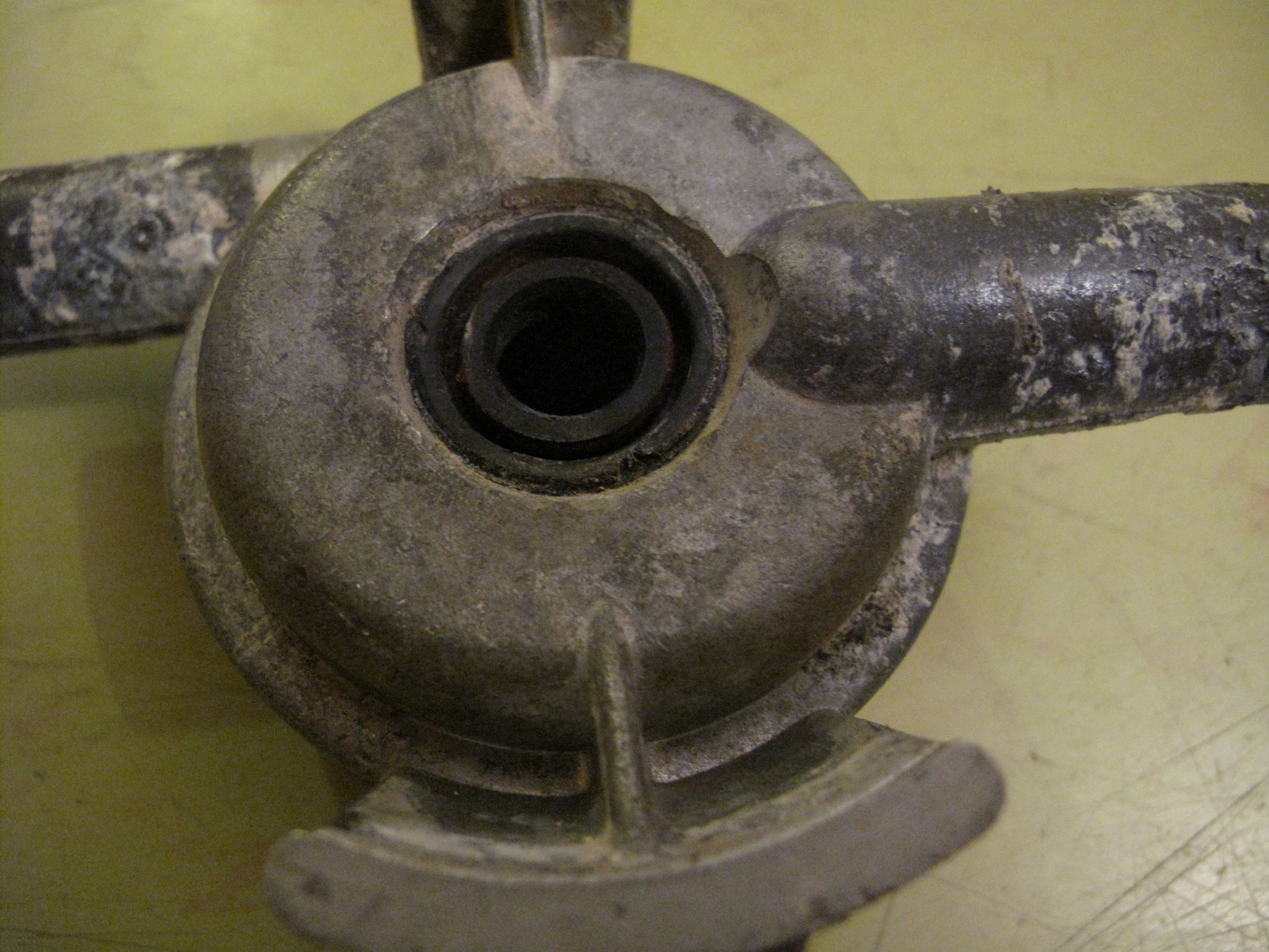 Čerpadlo pračky Romo ze spodu. Uprostřed je vidět černé gufero, které těsní kolem hřídele. Nedochází tak k úniku vody.